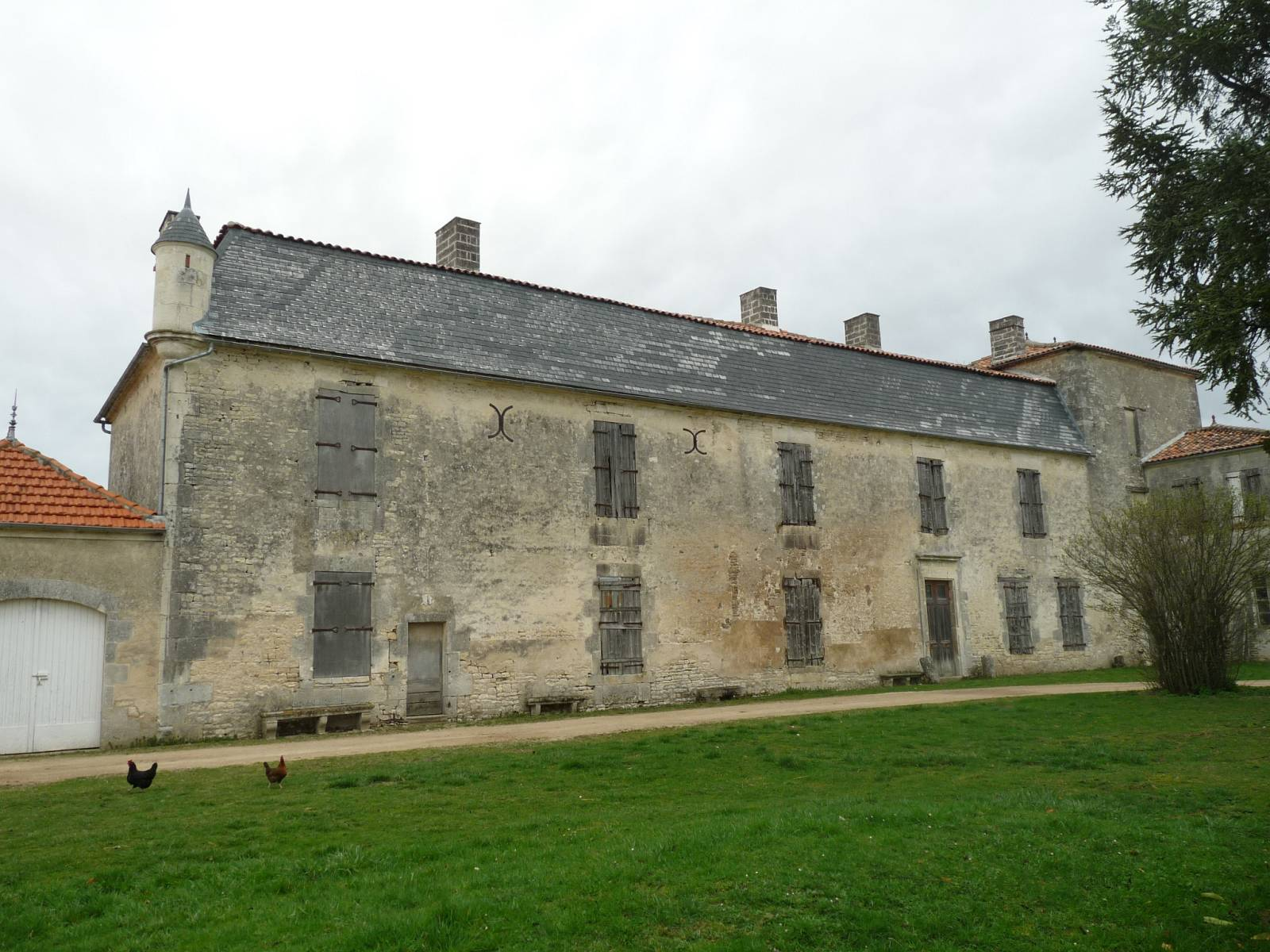 logis de Rulle, Sigogne, Charente, France